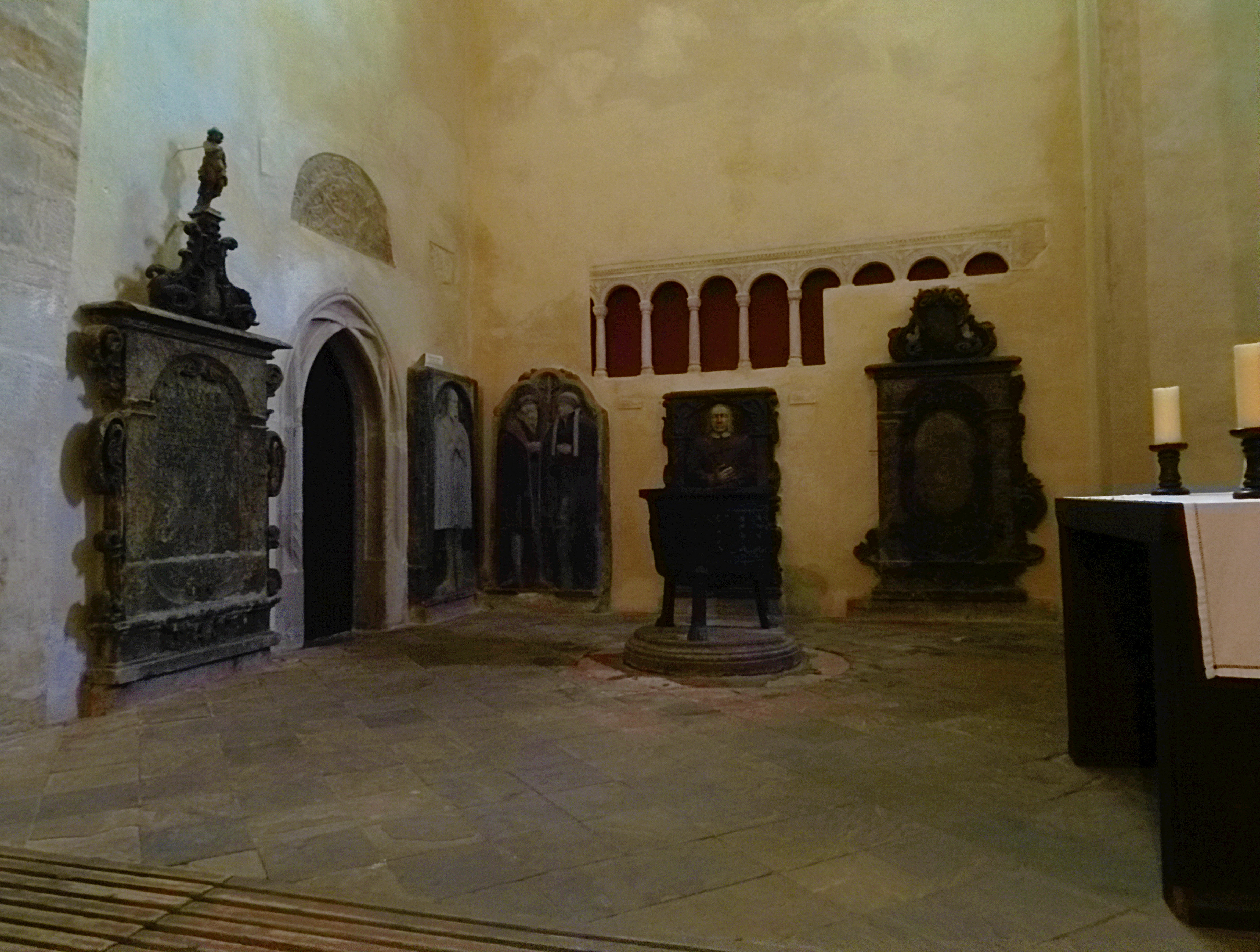 Sankt Ulrici (Sangerhausen), Nordquerhaus mit Taufkessel von 1369 und Epitaphien